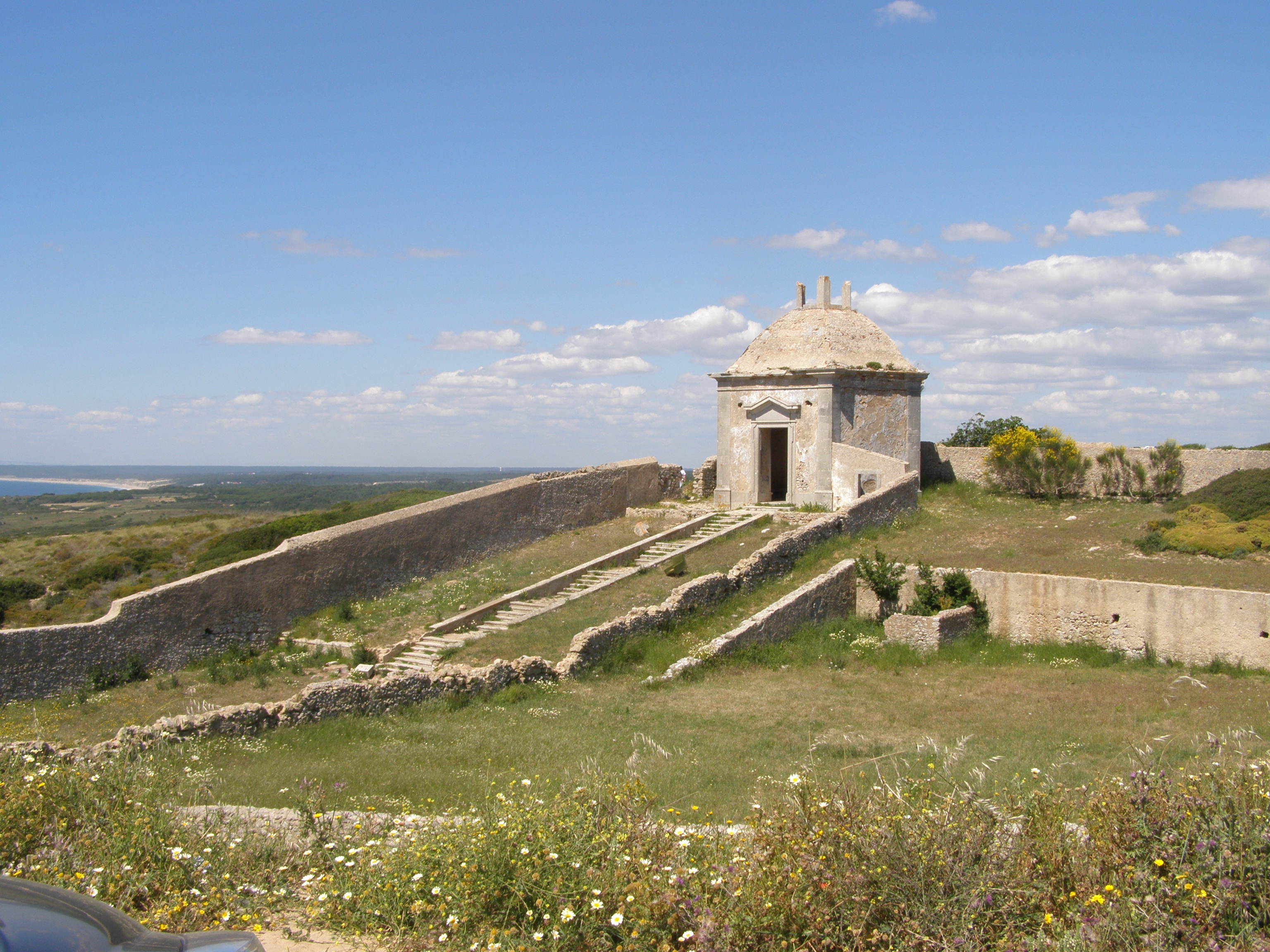 Cabo Espichel